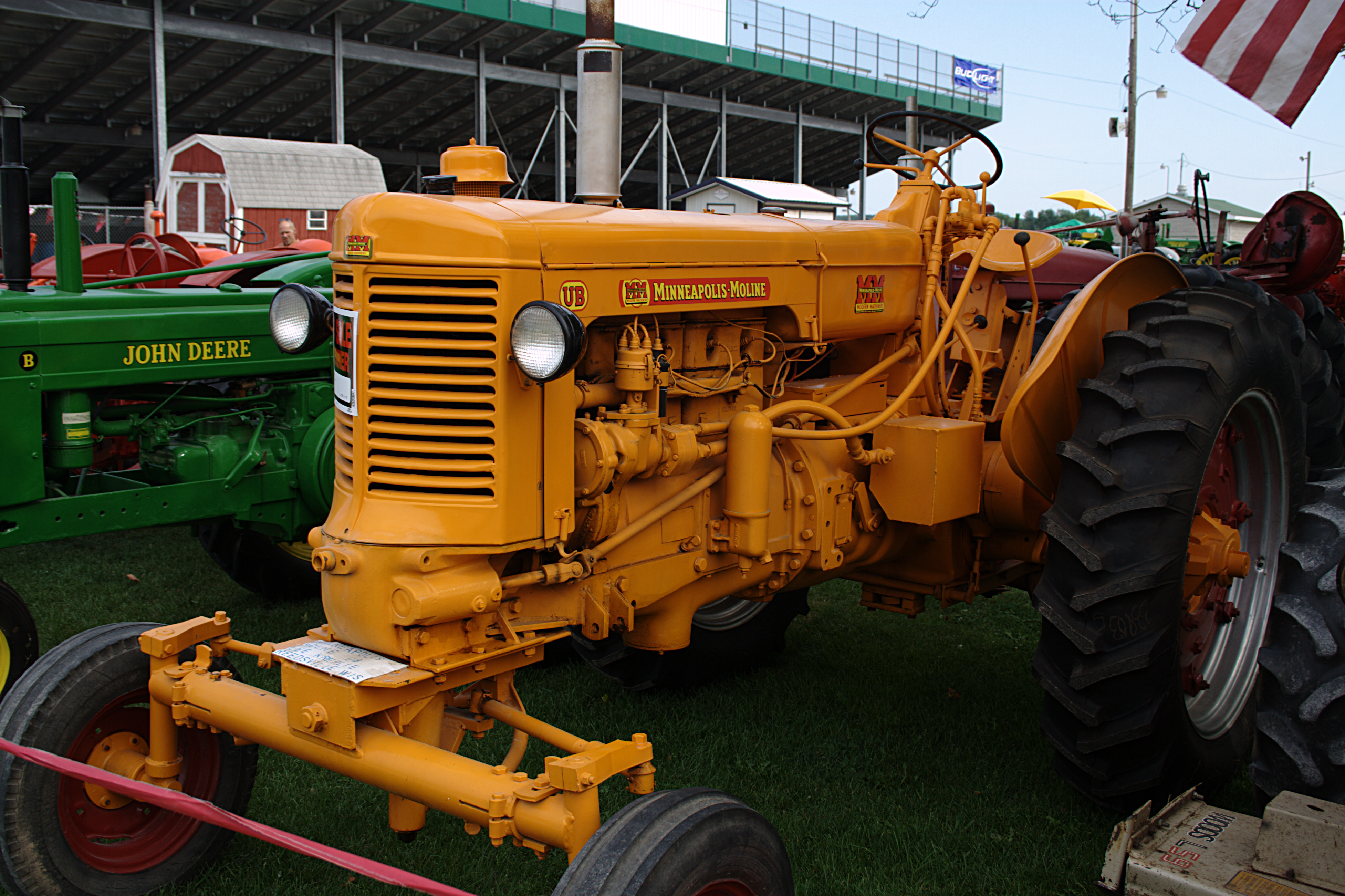 Minneapolis-Moline UB